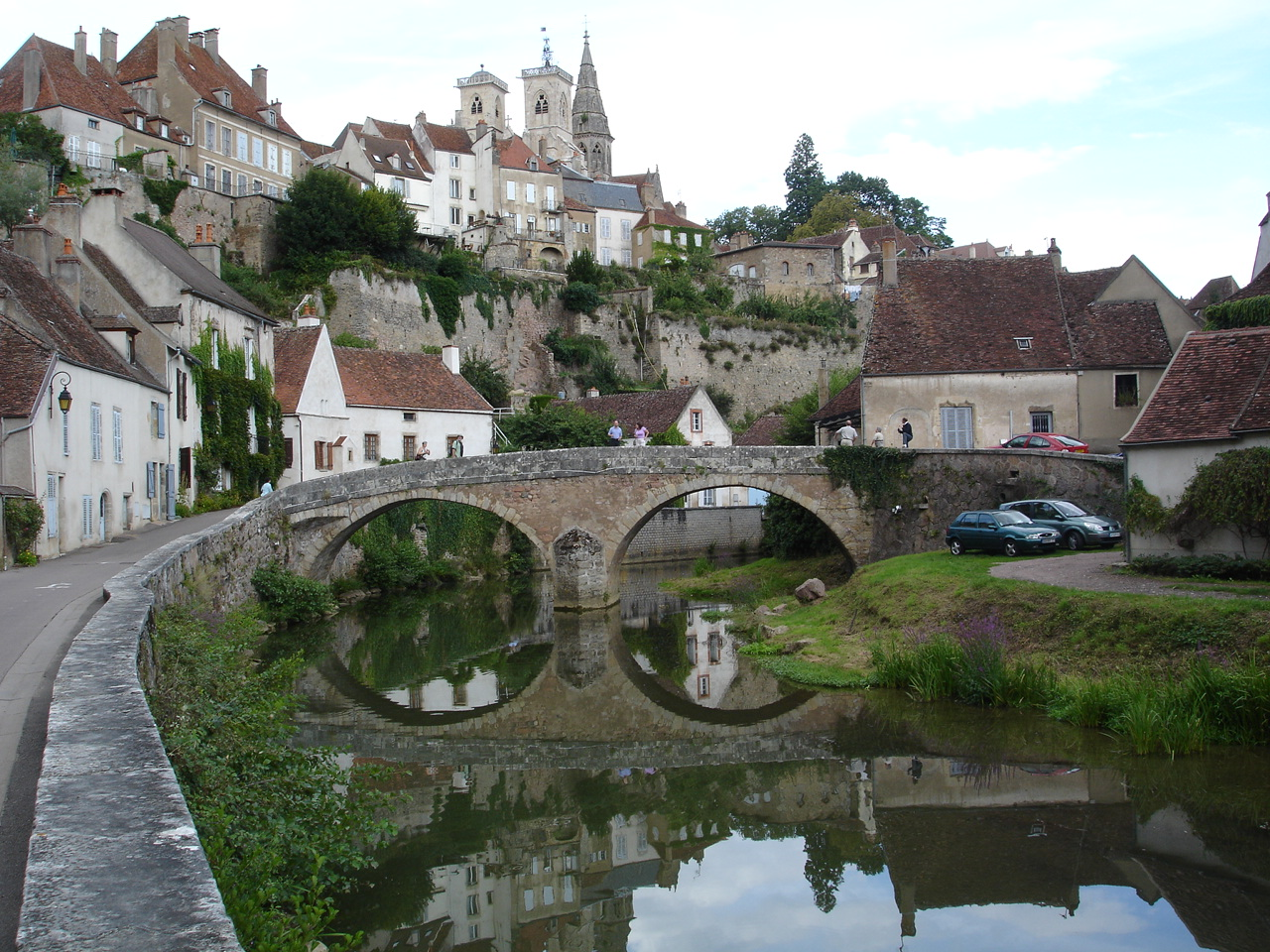 Pont Pinard sur l'Armançon au pied des remparts de Semur-en-Auxois pris en août 2006